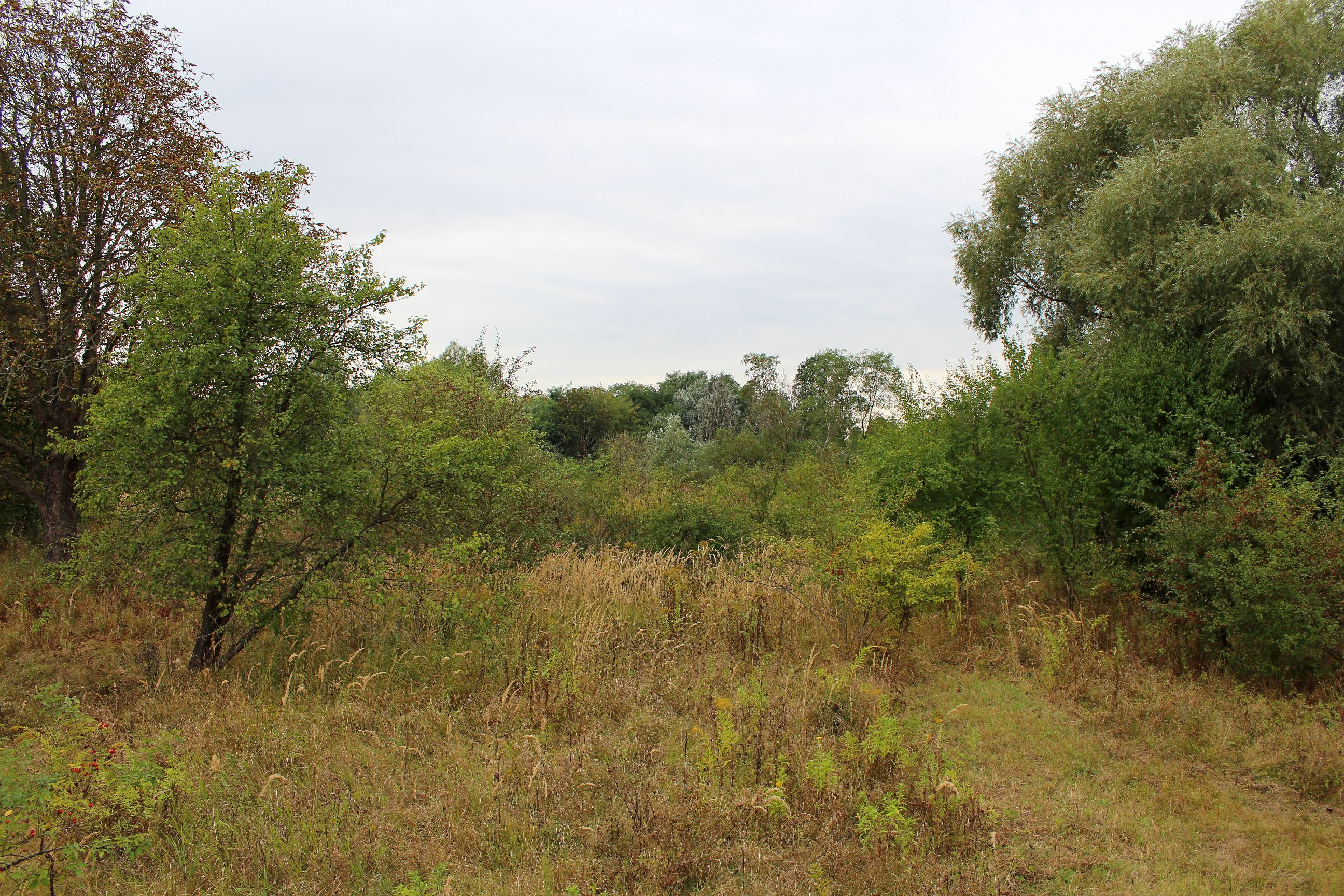 Einstige Ortslage von Alt Lönnewitz